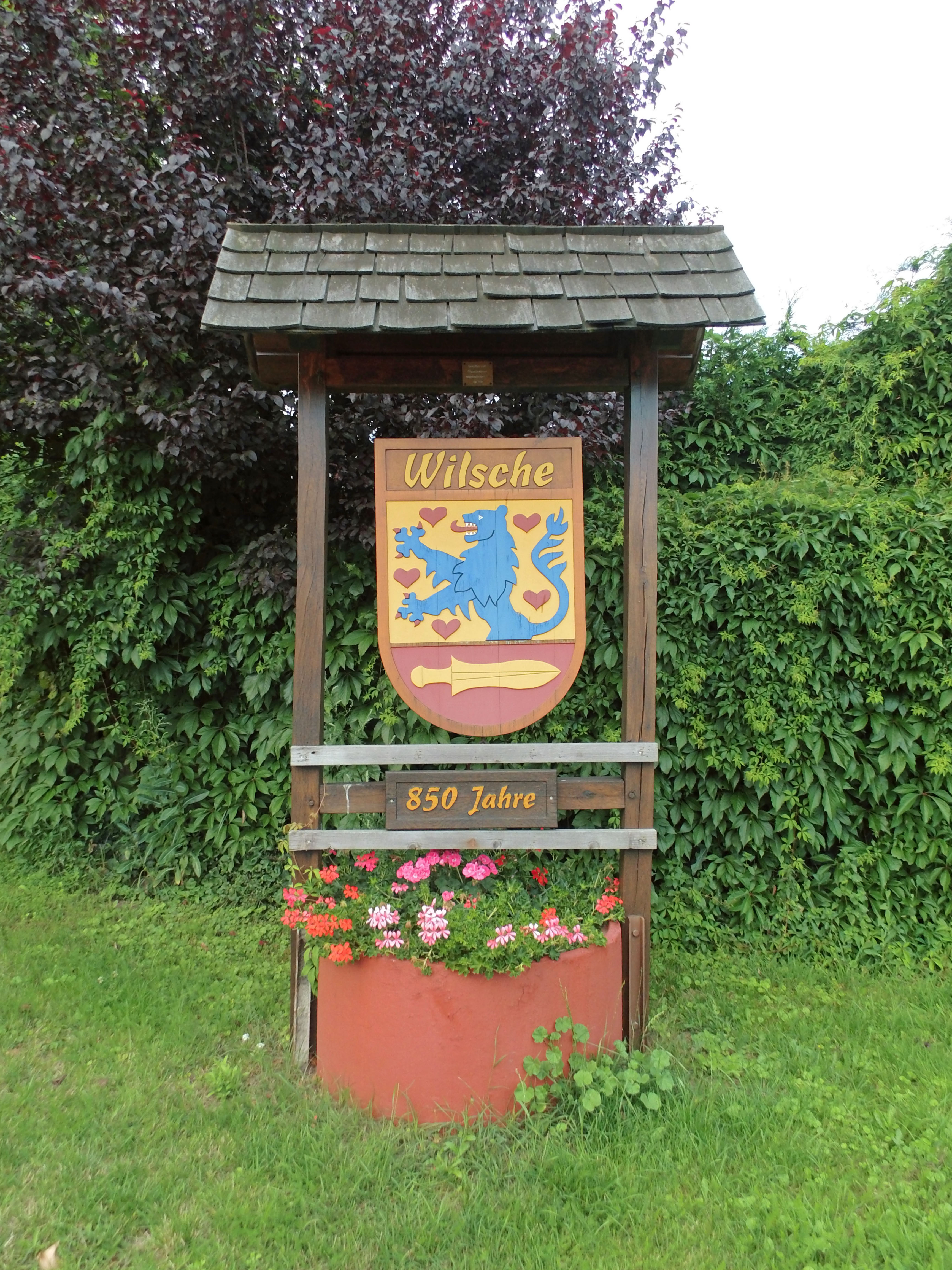 Schild am südlichen Ortseingang von Wilsche (Ortsteil von Gifhorn).